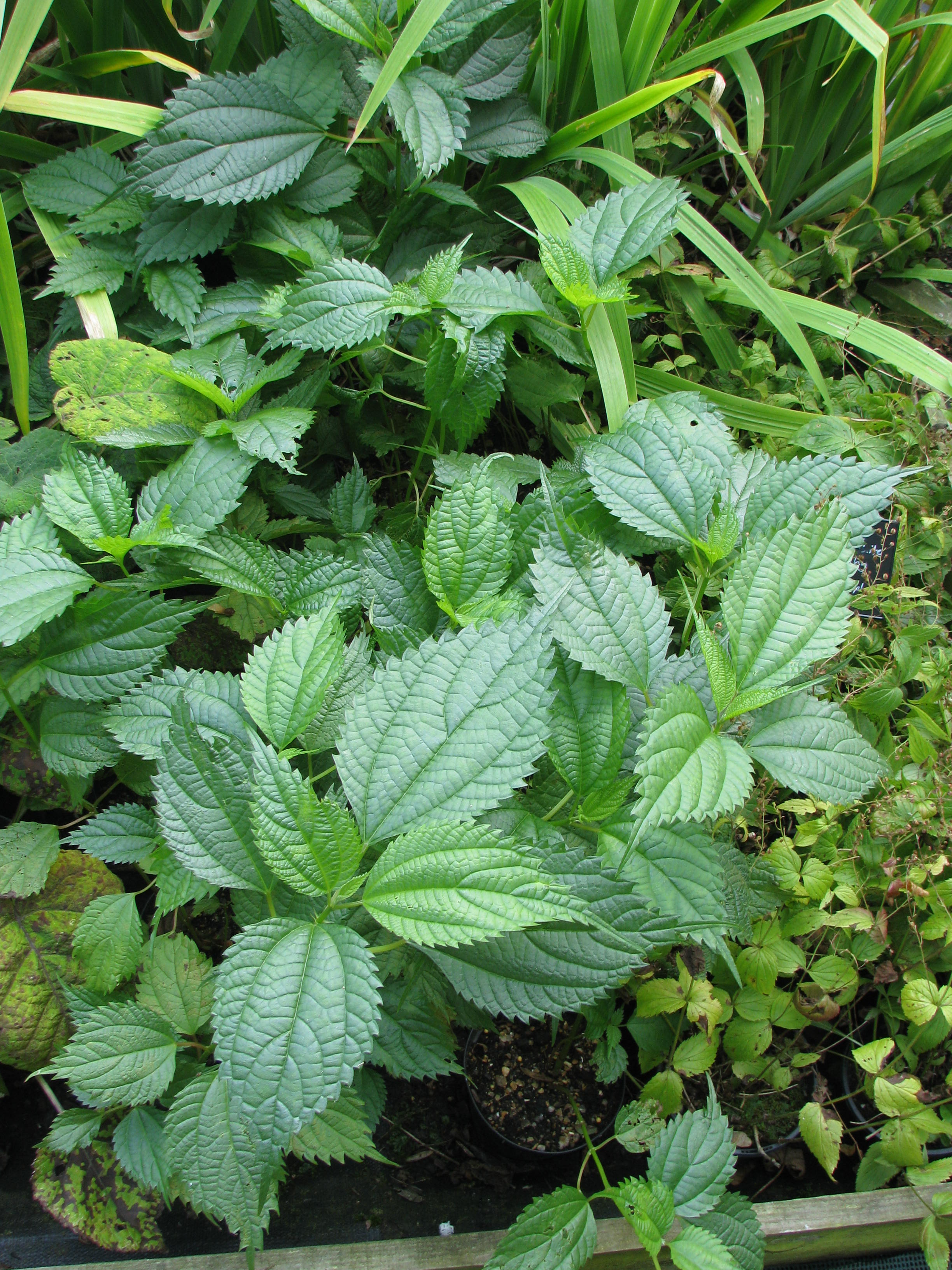 Boehmeria sieboldiana